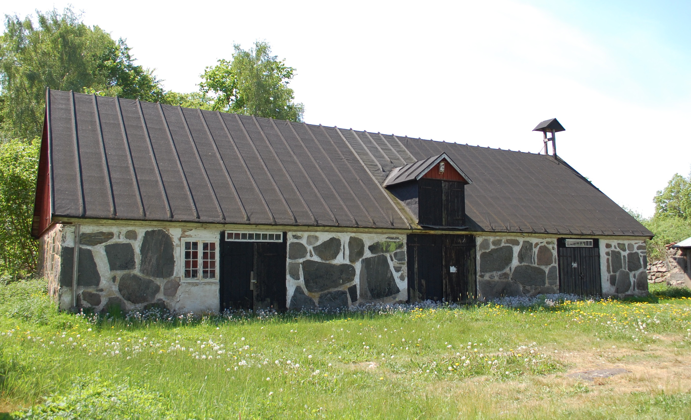 Pulverfabrik Torsebro, Wirtschaftsgebäude